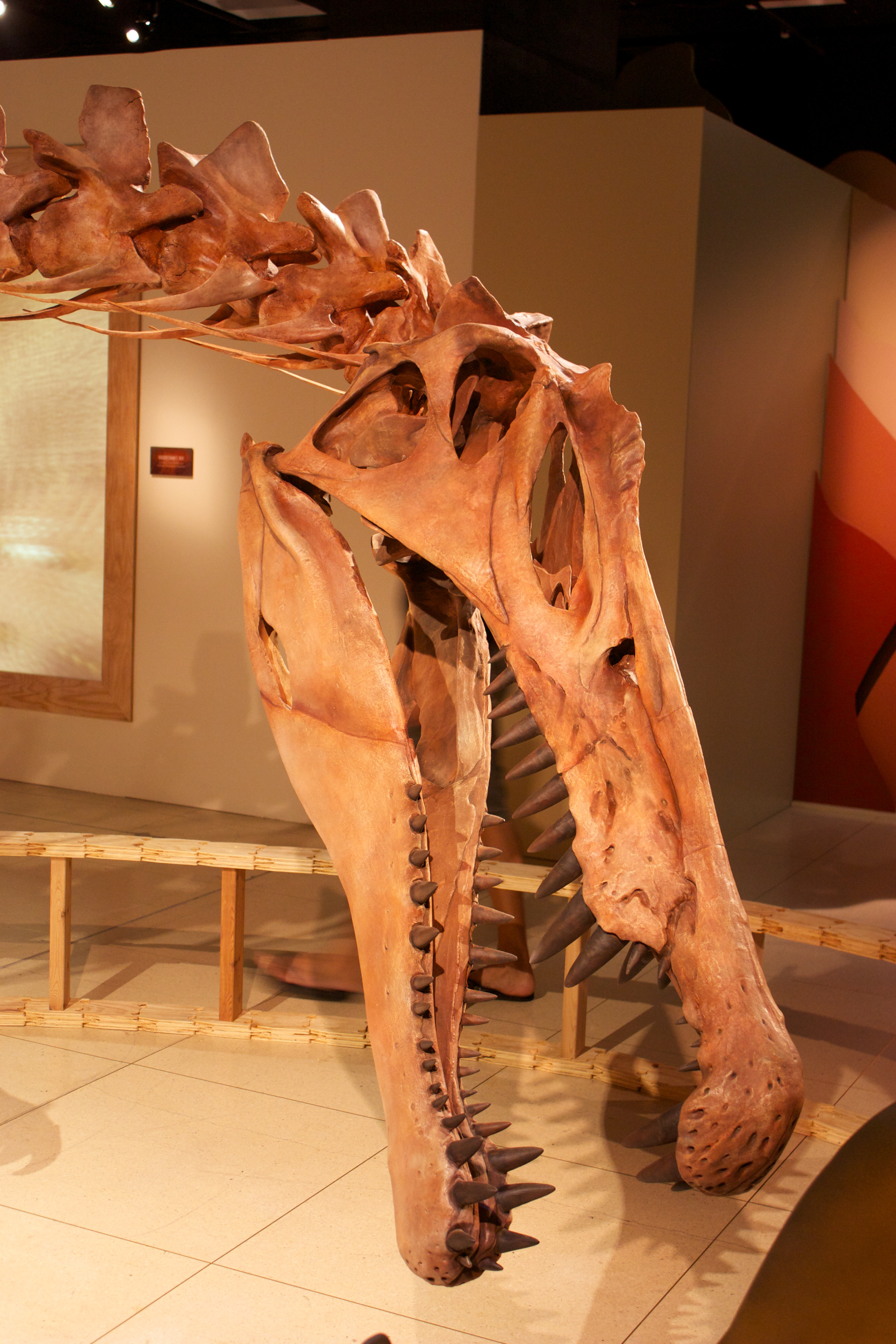 Spinosaurus